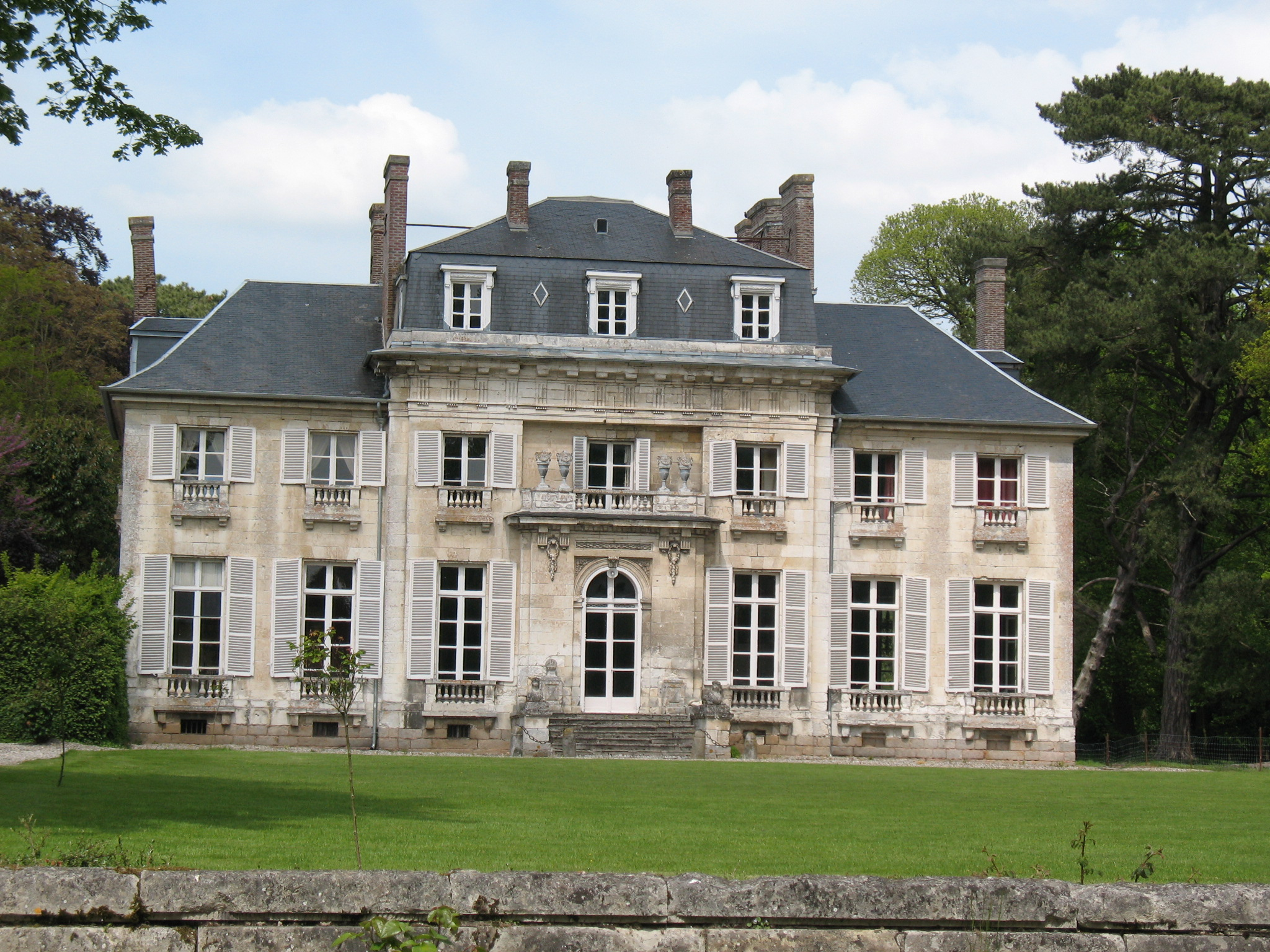 Le château de style néo-classique, a été construit entre 1786 et 1789. Il est formé d'un corps de logis rectangulaire composé d'un avant-corps central pourvu d'un étage de combles et de deux ailes.